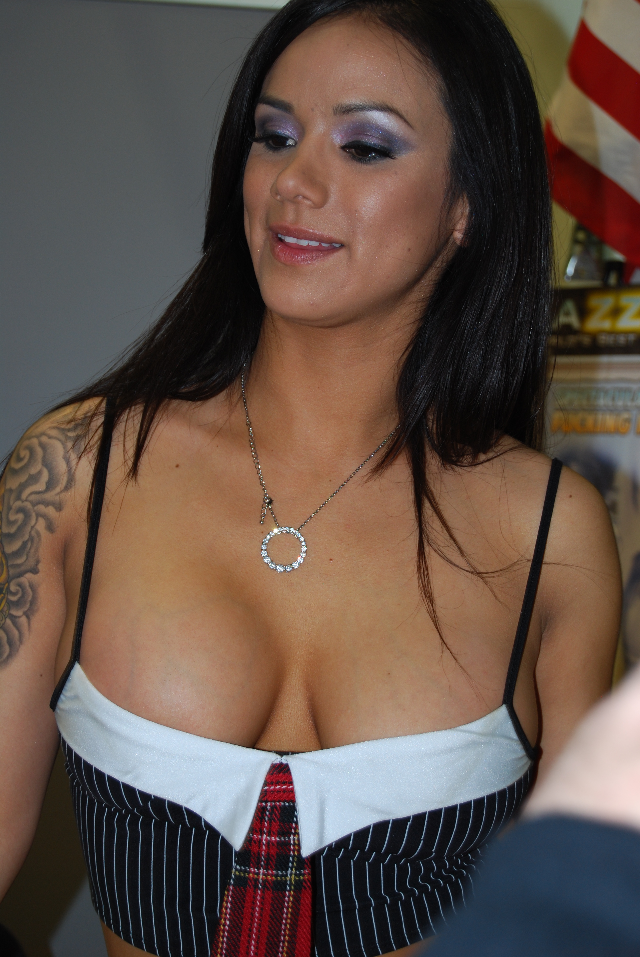 AEE2008_Nikon_Day1 245